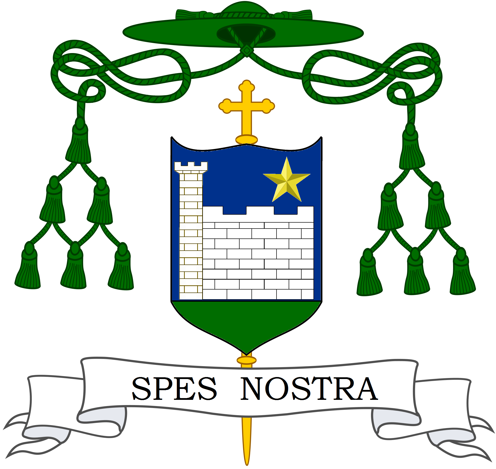 Brasão de Dom Bernard Fellay, superior da Fraternidade Sacerdotal São Pio X